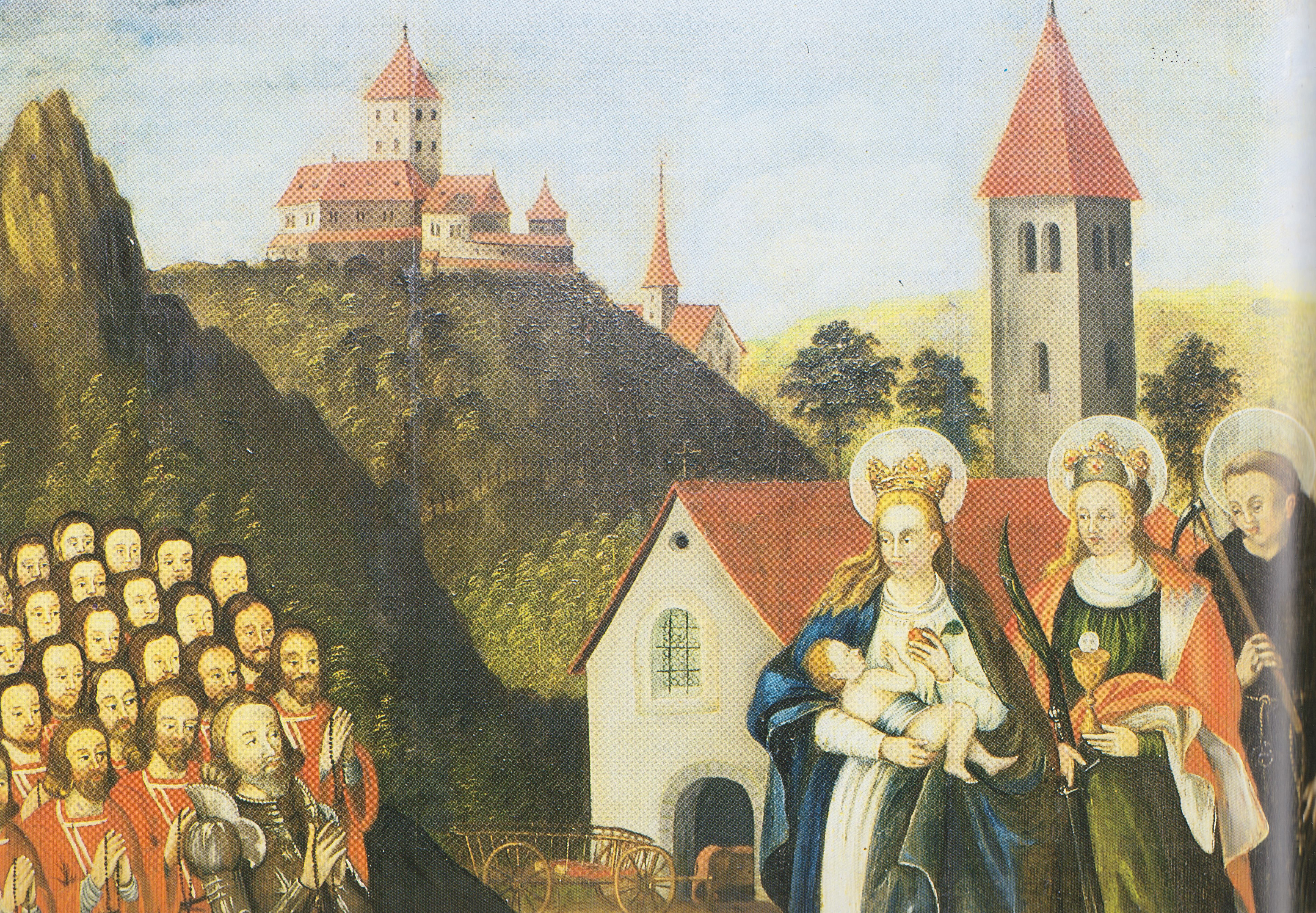 Bildtafel aus der Zeit um 1550. Im Hintergrund die Burg Rosenberg, im Vordergrund links Graf Babo.